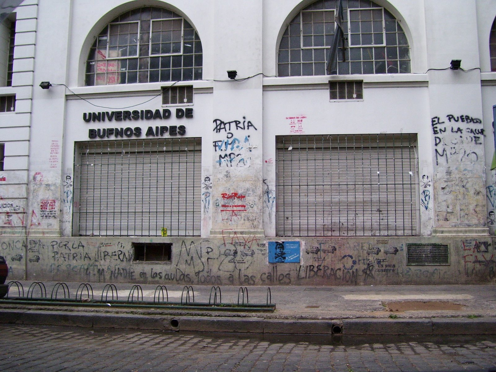 Facultad de Ciencias Sociales (UBA) - Edificio calle Ramos Mejía